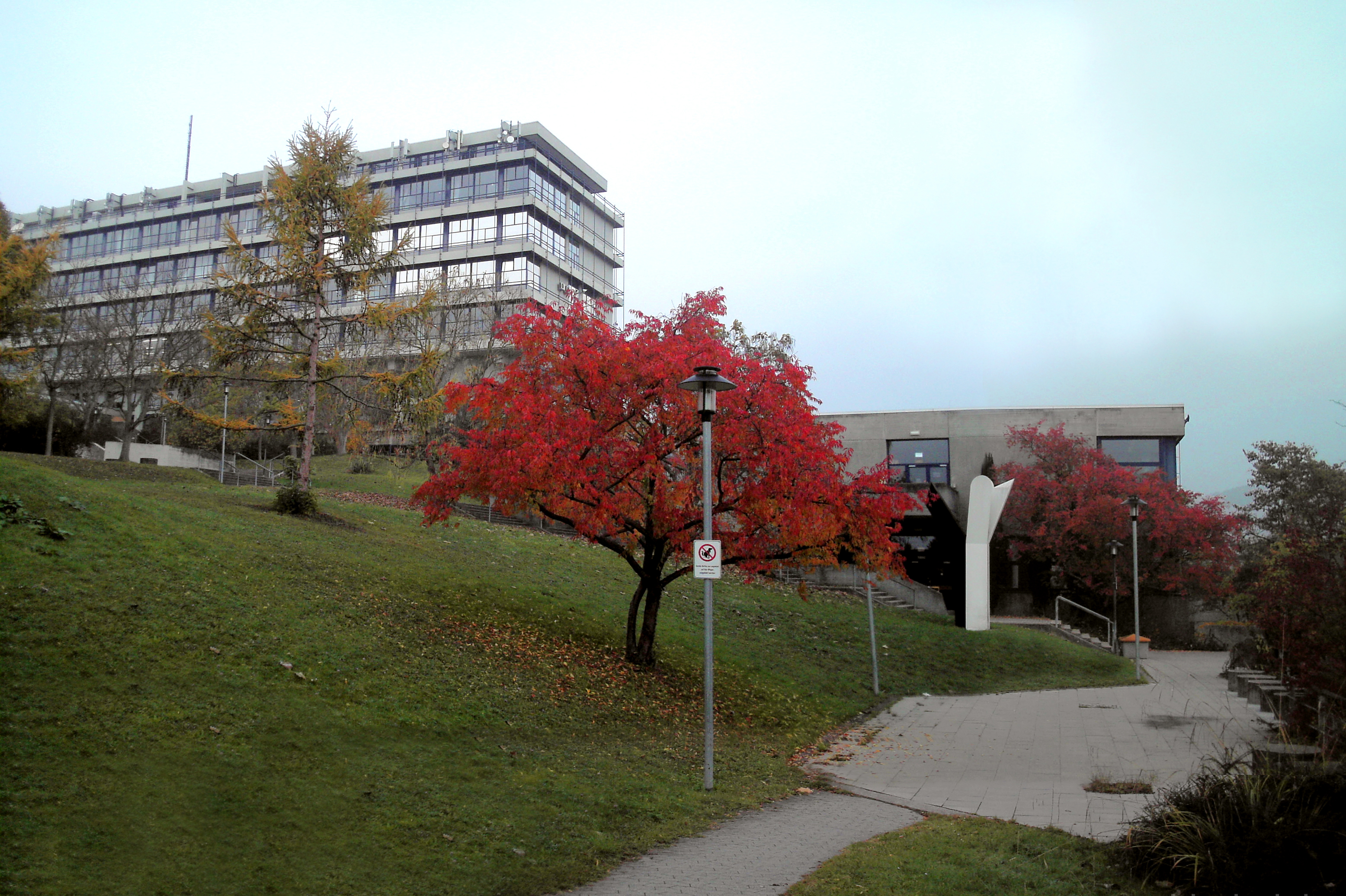 Hochschulzentrum (HZE)